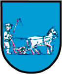 Herb Świętoszowic (gmina Zbrosławice, powiat tarnogórski, województwo śląskie, Polska)